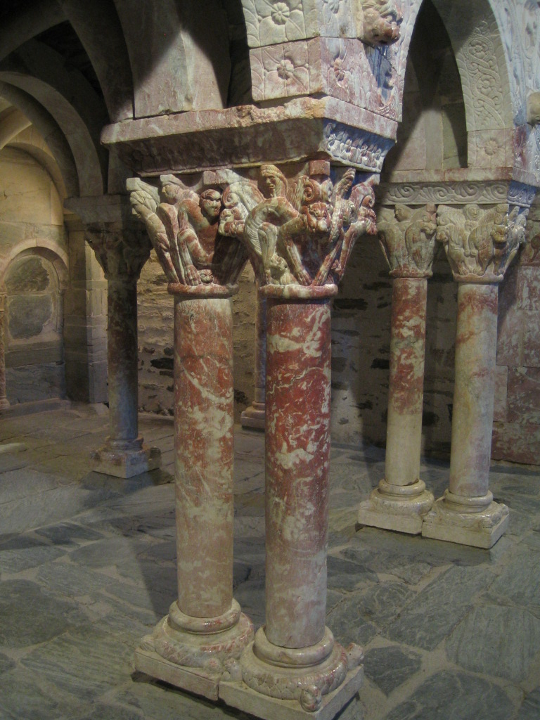 capiteles de la tribuna de la abadía de Serrabona (Francia), donde se observa una ménsula y parte de una de las arcadas laterales en la zona superior